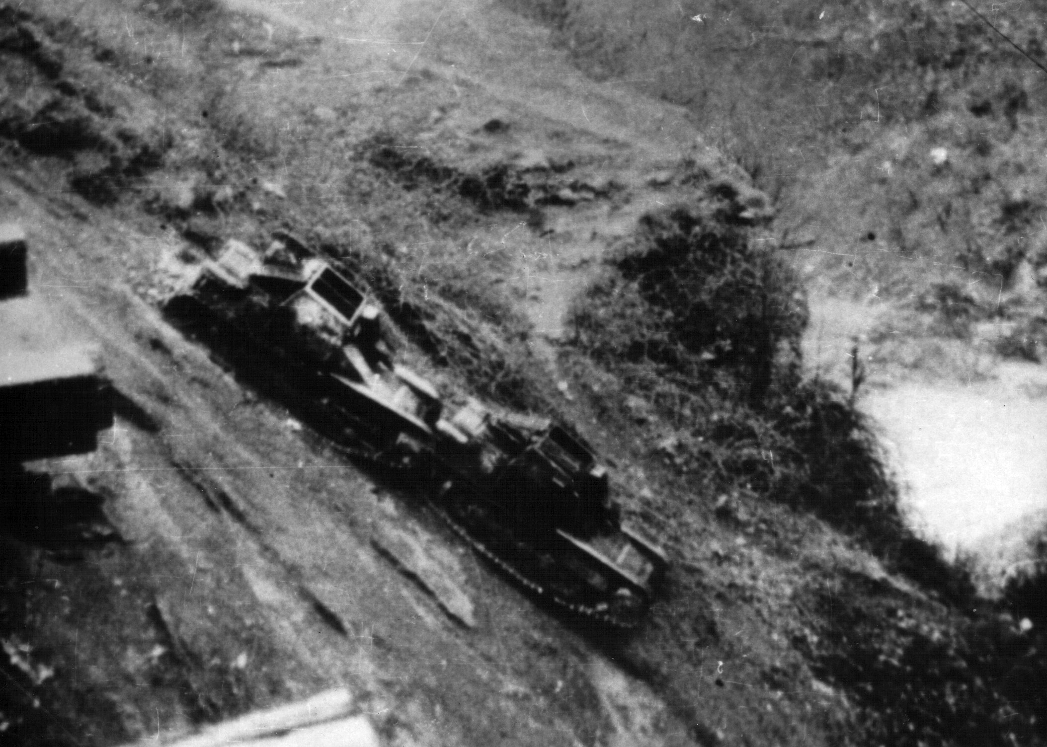 Srpskohrvatski / српскохрватски: Uništeni tenkovi italijanske divizije Murđe tokom bitke na Neretvi 1943. godine.